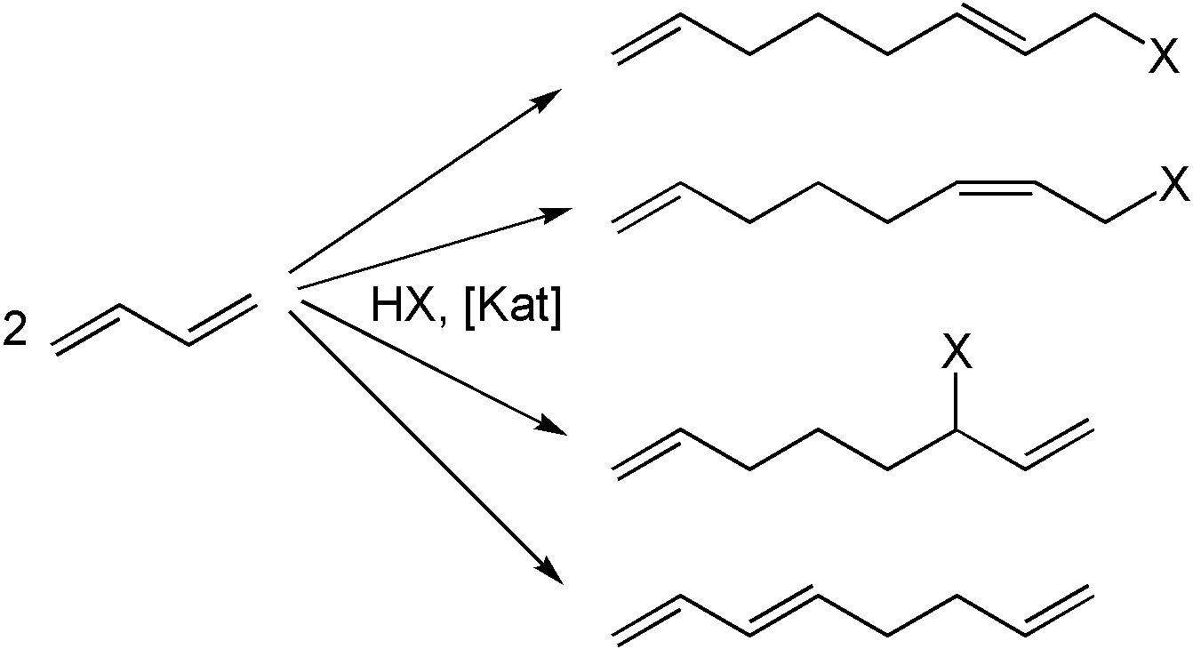 Telomerisation